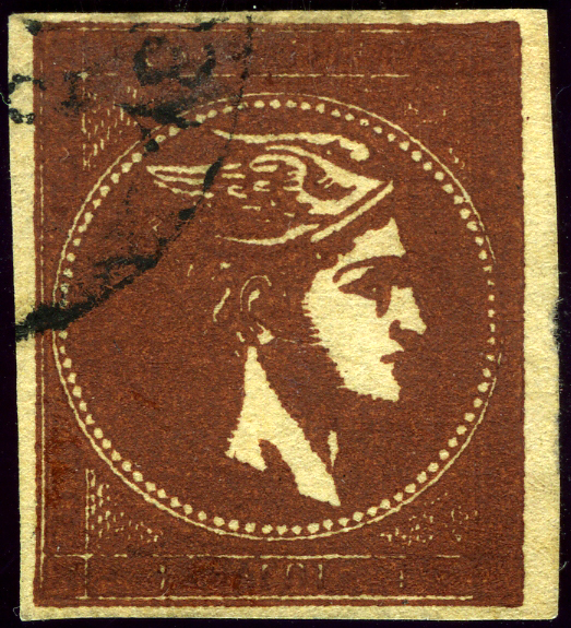 LHH - Tirage sur papier crème 1875+ - 1 Lepton